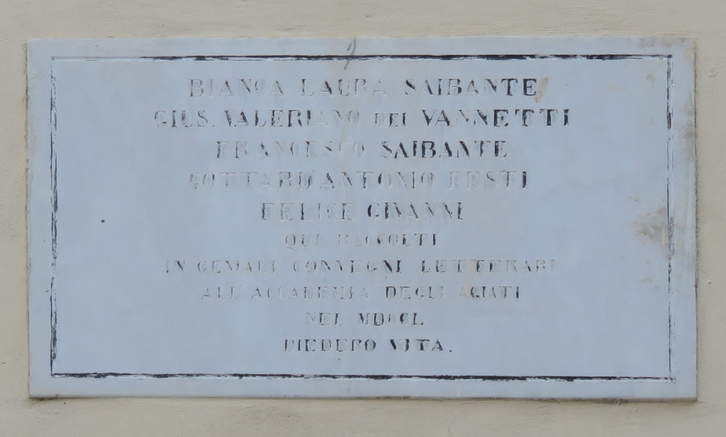 epigrafe sulla casa in Via Garibaldi 77 a Rovereto, luogo di incontro dei primi agiati: BIANCA LAURA SAIBANTE GIUS. VALERIANO DEI VANNETTI FRANCESCO SAIBANTE GOTTARDANTONIO FESTI FELICE GIVANNI QUI RACCOLTI IN GENIALI CONVEGNI LETTERARI ALL’ACCADEMIA DEGLI AGIATI NEL MDCCL DIEDERO VITA